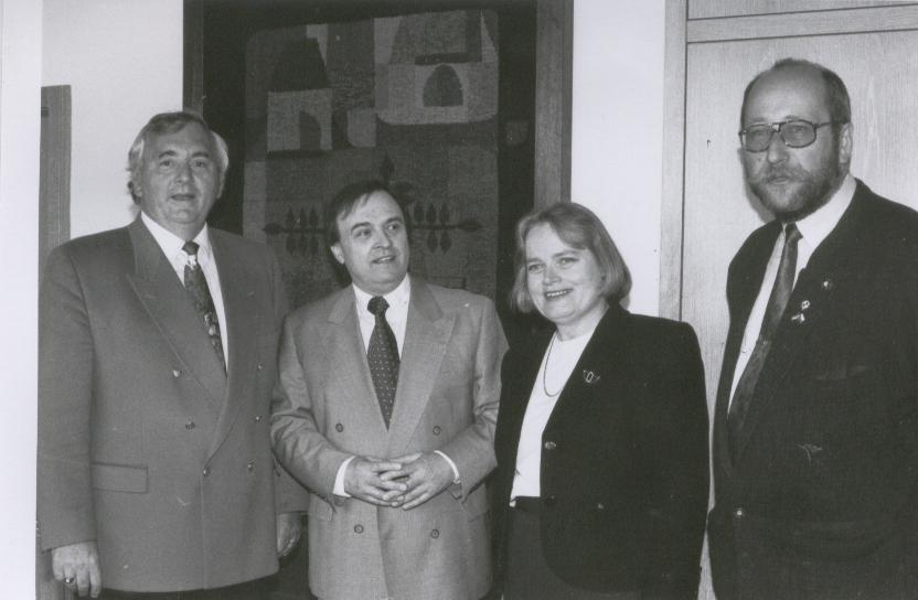 Oberbürgermeister Hans Schröpf empfängt erstmals den tschechischen Botschafter und Dichter Dr. Jiri Grusa mit Frau Sabine Grusa am 7. Mai 1994 im Neuen Rathaus von Weiden in der Oberpfalz (rechts im Bild Bernhard M. Baron).